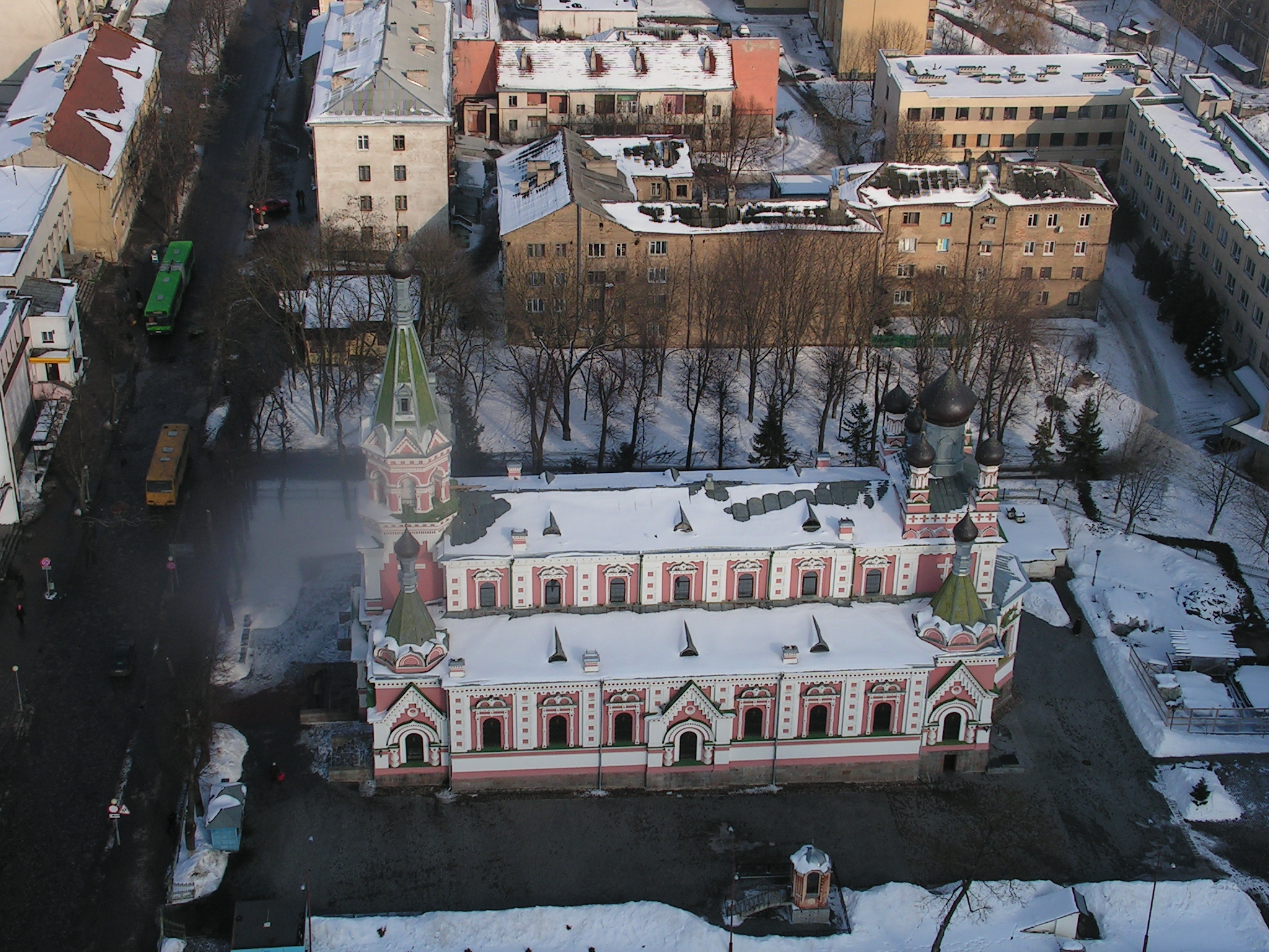 Від Пакроўскай царквы (Гродна) з вышыні птушынага палёту